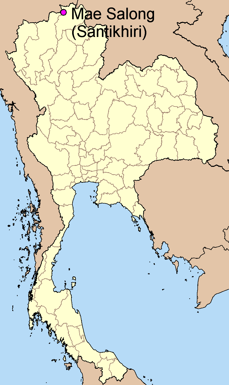 Map of Mae Salong (แม่สลอง) aka Santikhiri, Thailand